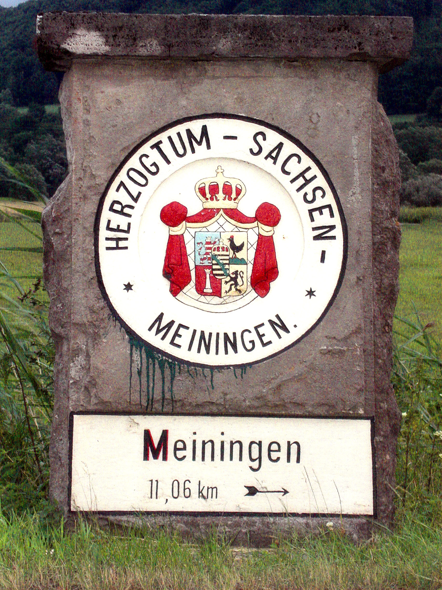 Grenzstein des Herzogtums Sachsen-Meiningen zwischen Ellingshausen und Rohr